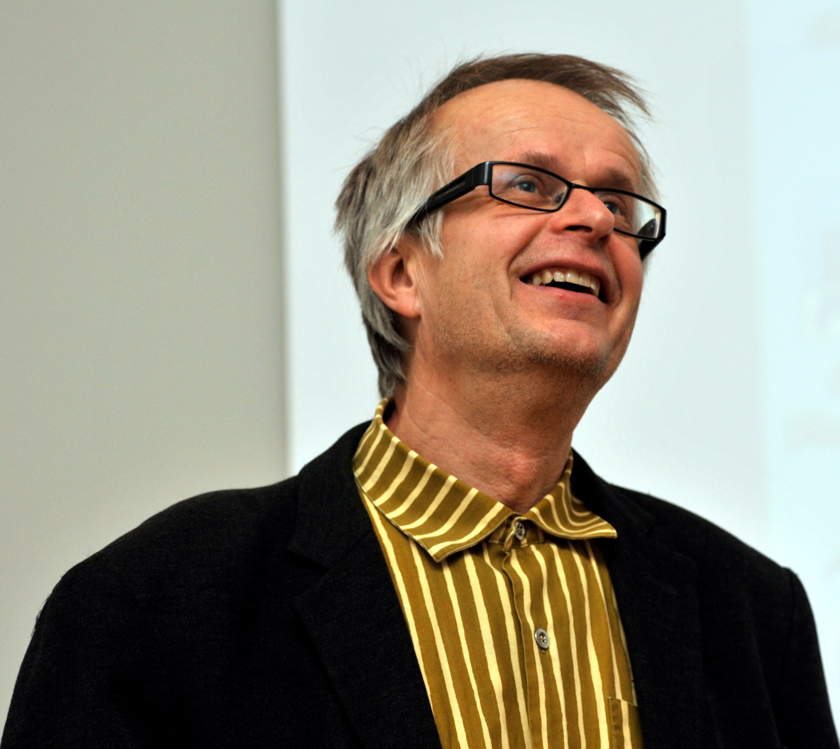 Ilkka Malmberg, suomalainen toimittaja, Helsinki, joulukuu 2010.